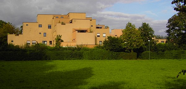 Finnstadt in Wulfen-Barkenberg, Architekt Toivo Korhonen, Helsinki